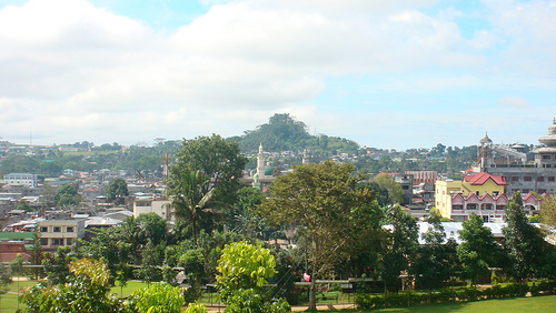 Marawi City